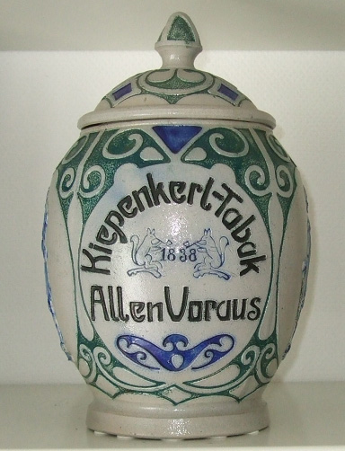 Oldenkott